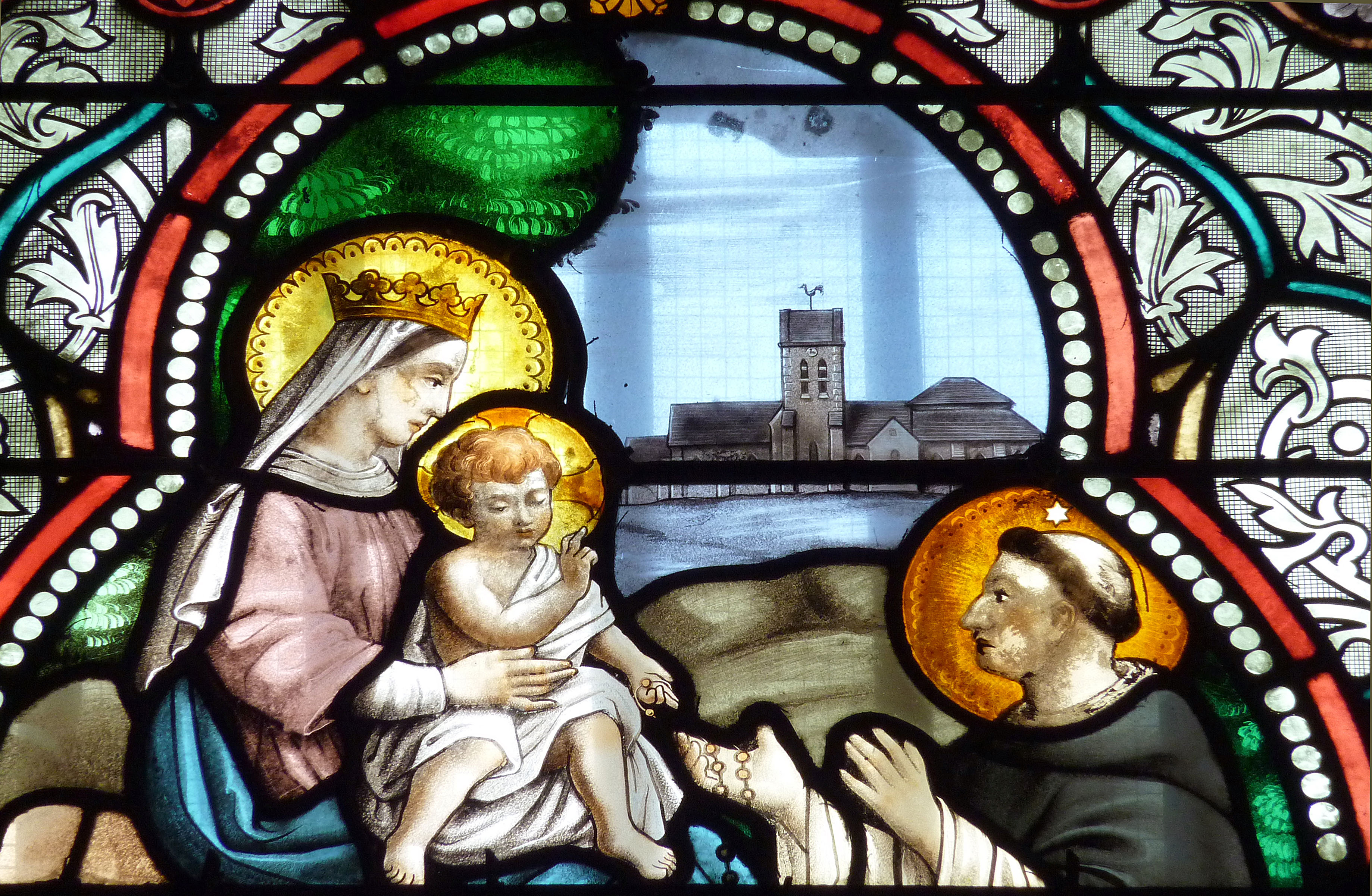 Katholische Pfarrkirche Saint-Pierre in Avon im Département Seine-et-Marne in der Region Île-de-France (Frankreich), Bleiglasfenster (Ausschnitt); Darstellung: Maria überreicht dem hl. Dominikus den Rosenkranz, im Hintergrund die Kirche von Avon